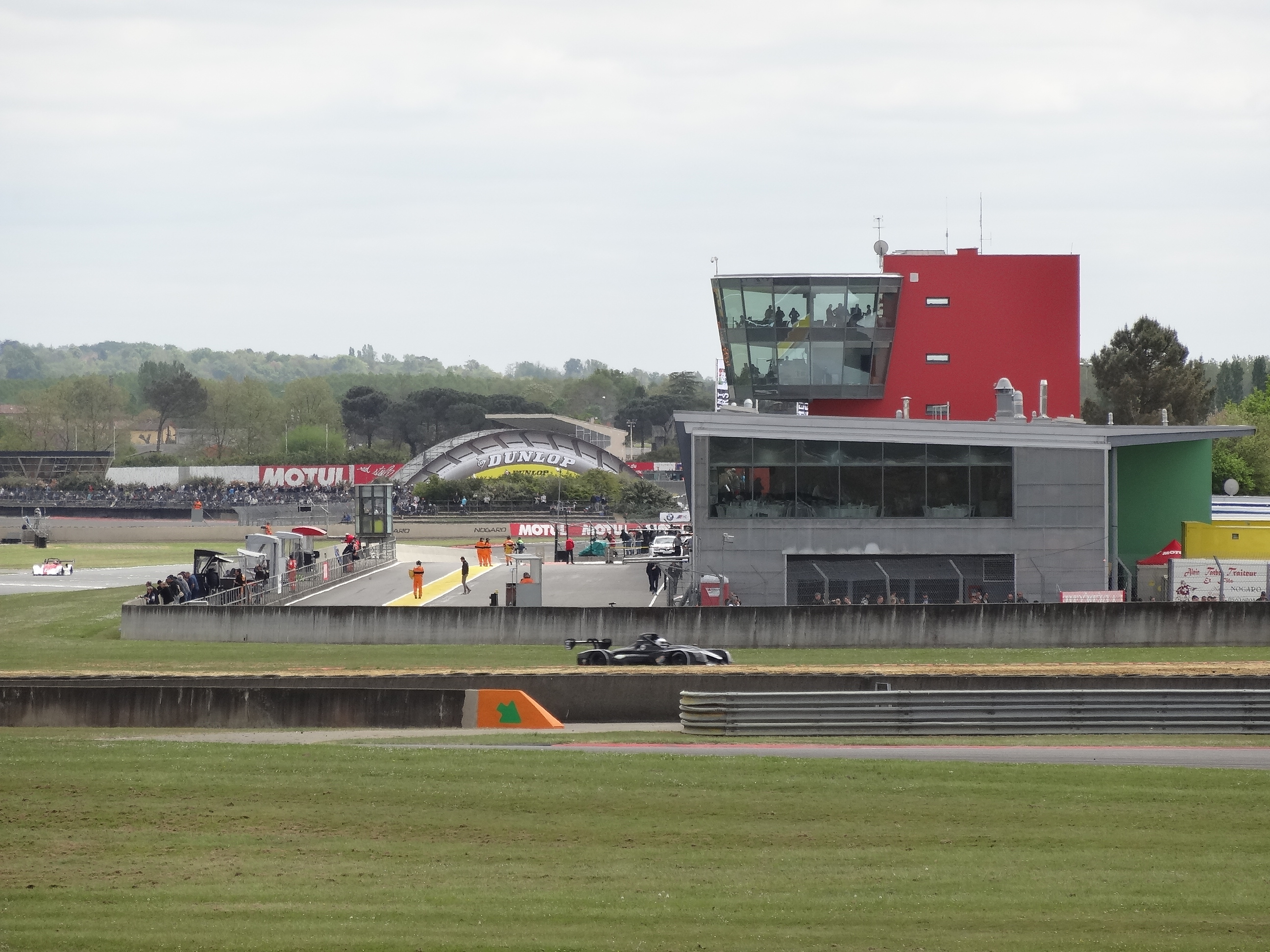 Coupes de Pâques 2017 à Nogaro.